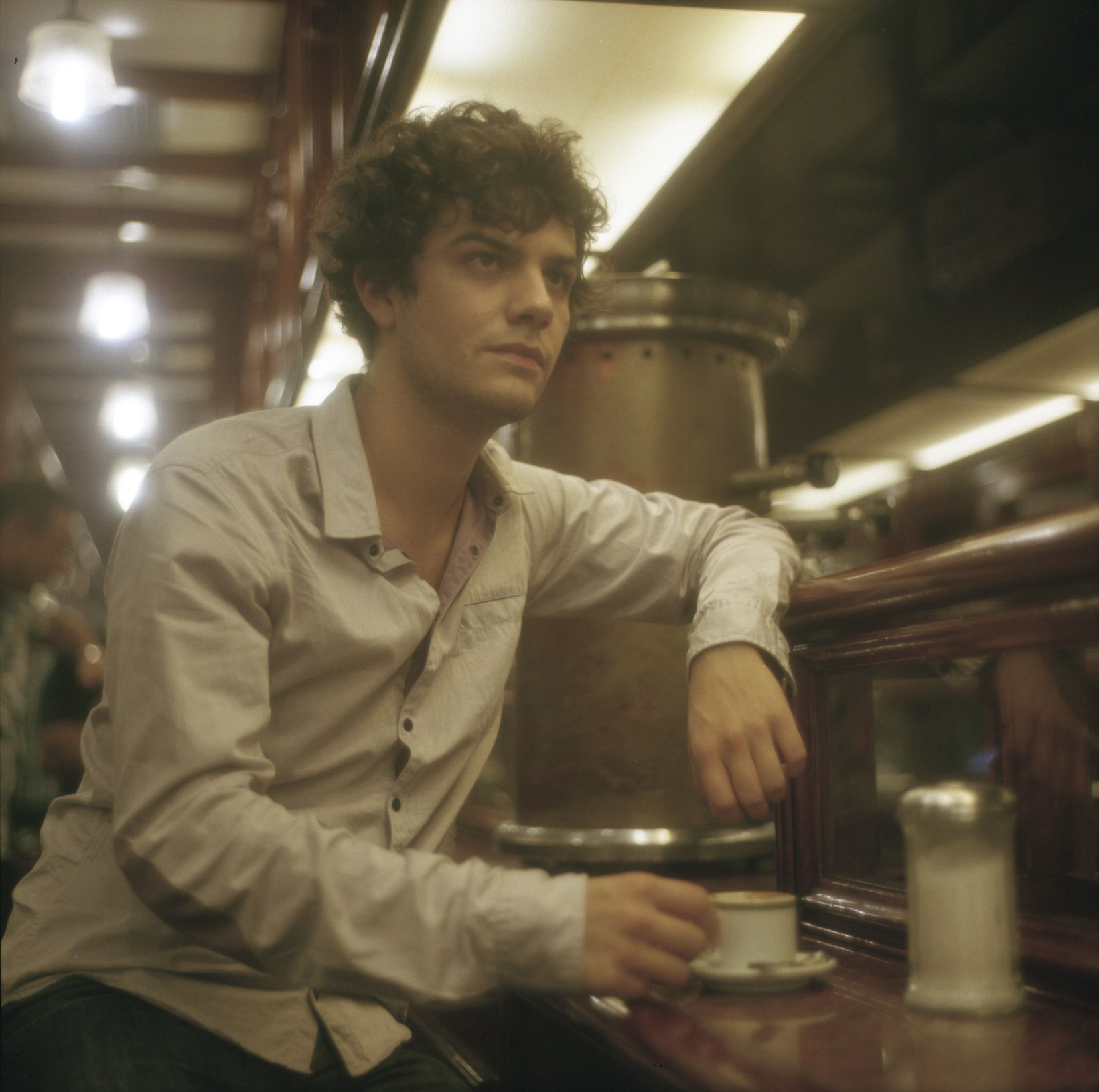 Miguel González